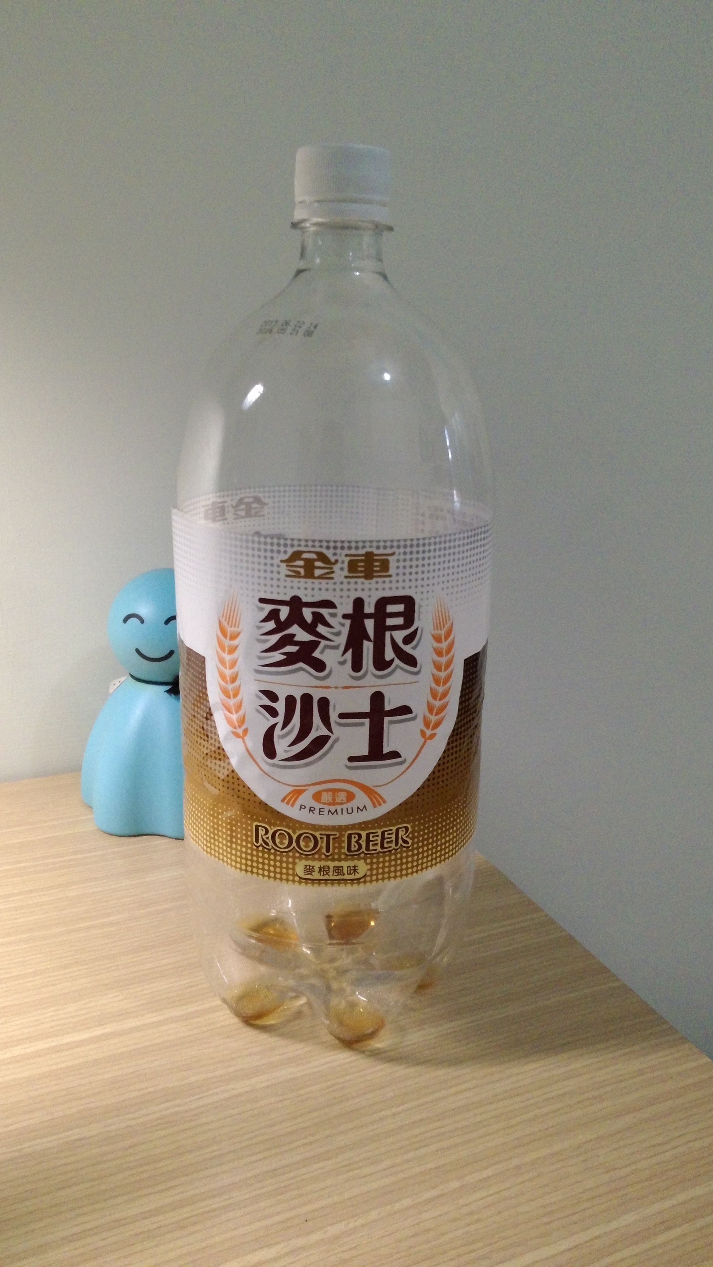 金車麥根沙士空瓶。